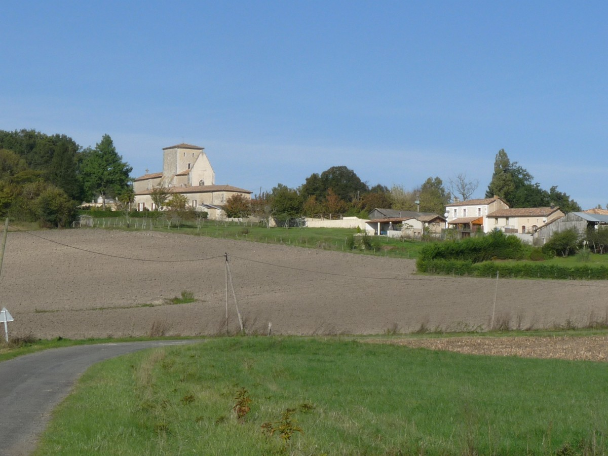 Vue de Chatenet, Charente-Maritime, France